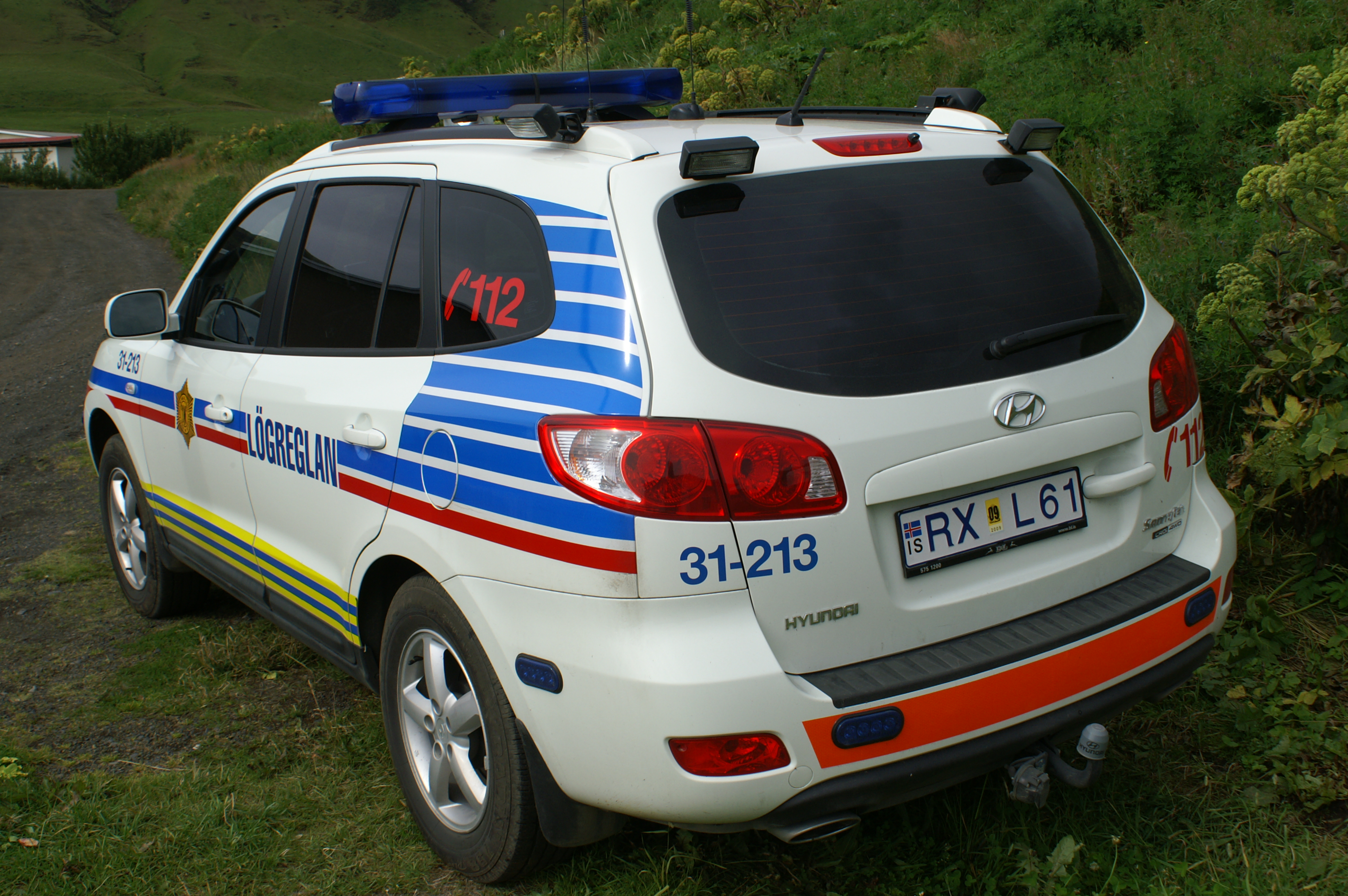 Politieauto uit IJsland